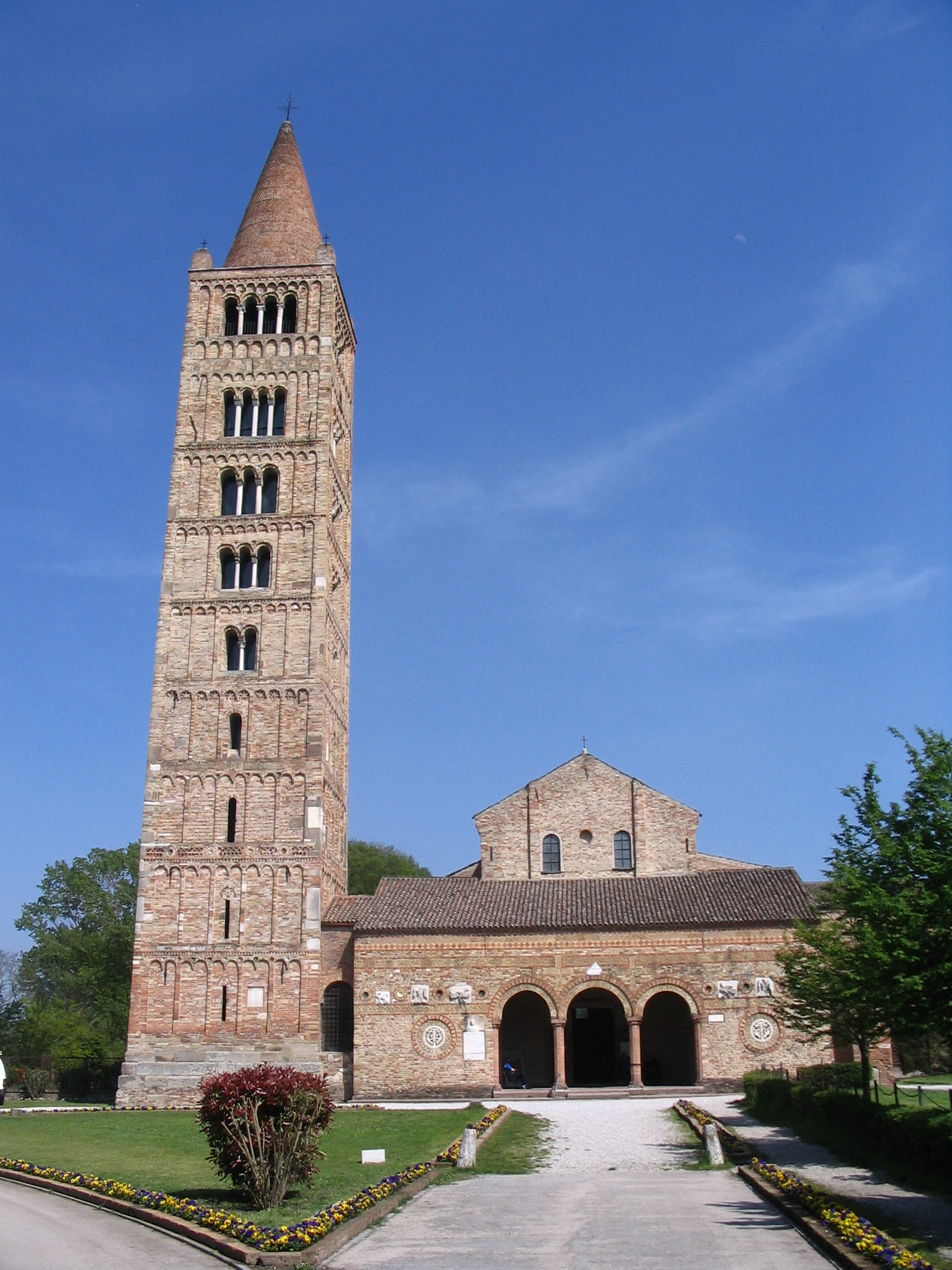 Abbazia di Pomposa - Front view